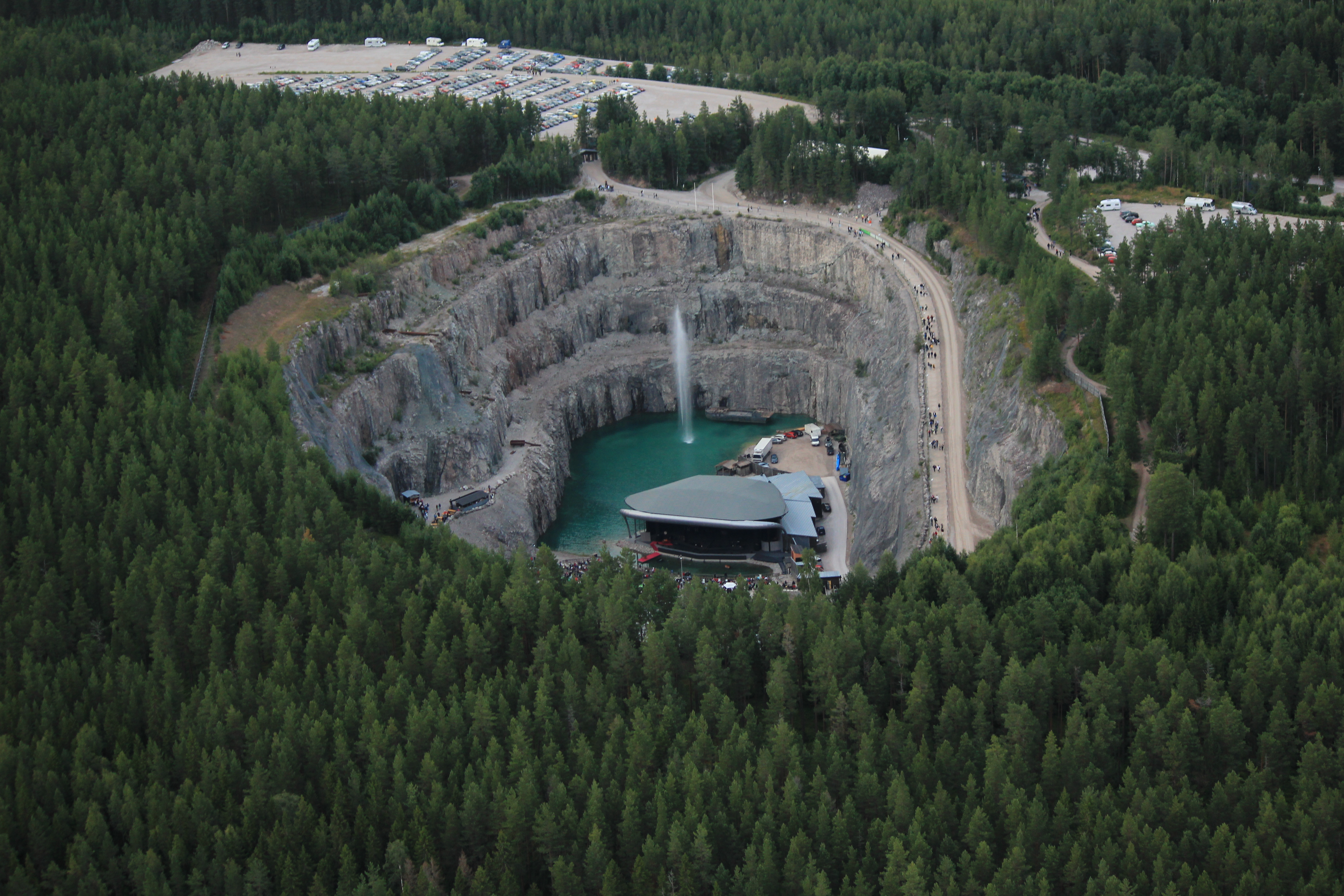 Flygfoto över Dalhalla, Rättviks kommun, Dalarnas län, Sverige This aerial photograph has been approved for publishing by the Swedish Armed Forces with the ID: FMTM 10 830:11043 This tag does not indicate the copyright status of the attached work. A normal copyright tag is still required. See Commons:Licensing for more information. English | svenska | +/−